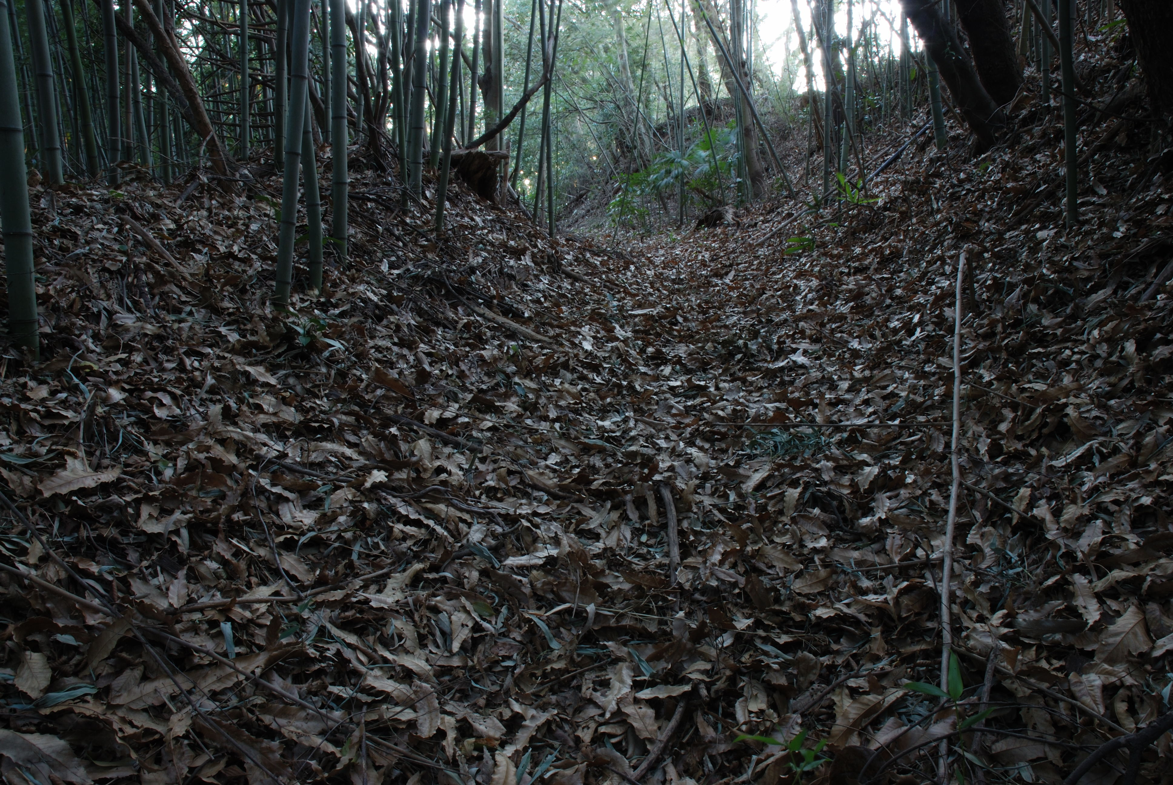 Kanabori Castle karabori